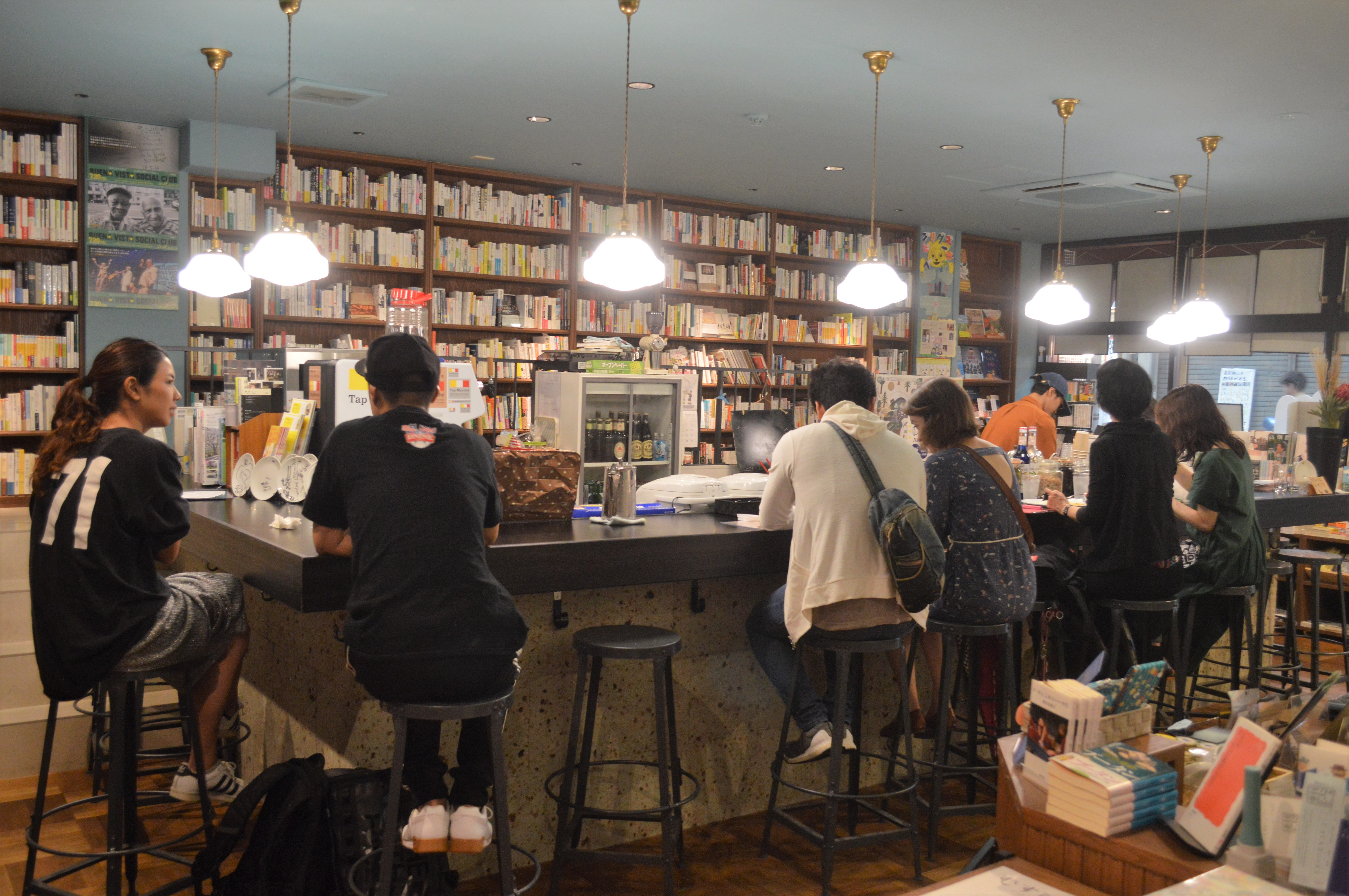 京都市上京区の出町枡形商店街にある映画館「出町座」。